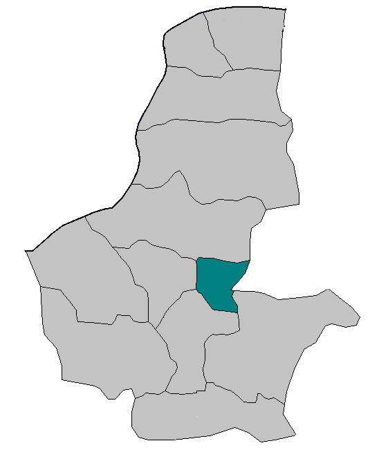 Oʻzbekcha/ўзбекча: rang bo'lgan soha Maymana tumanini Foryob viloyatining xaritasida ko'rsatadi.